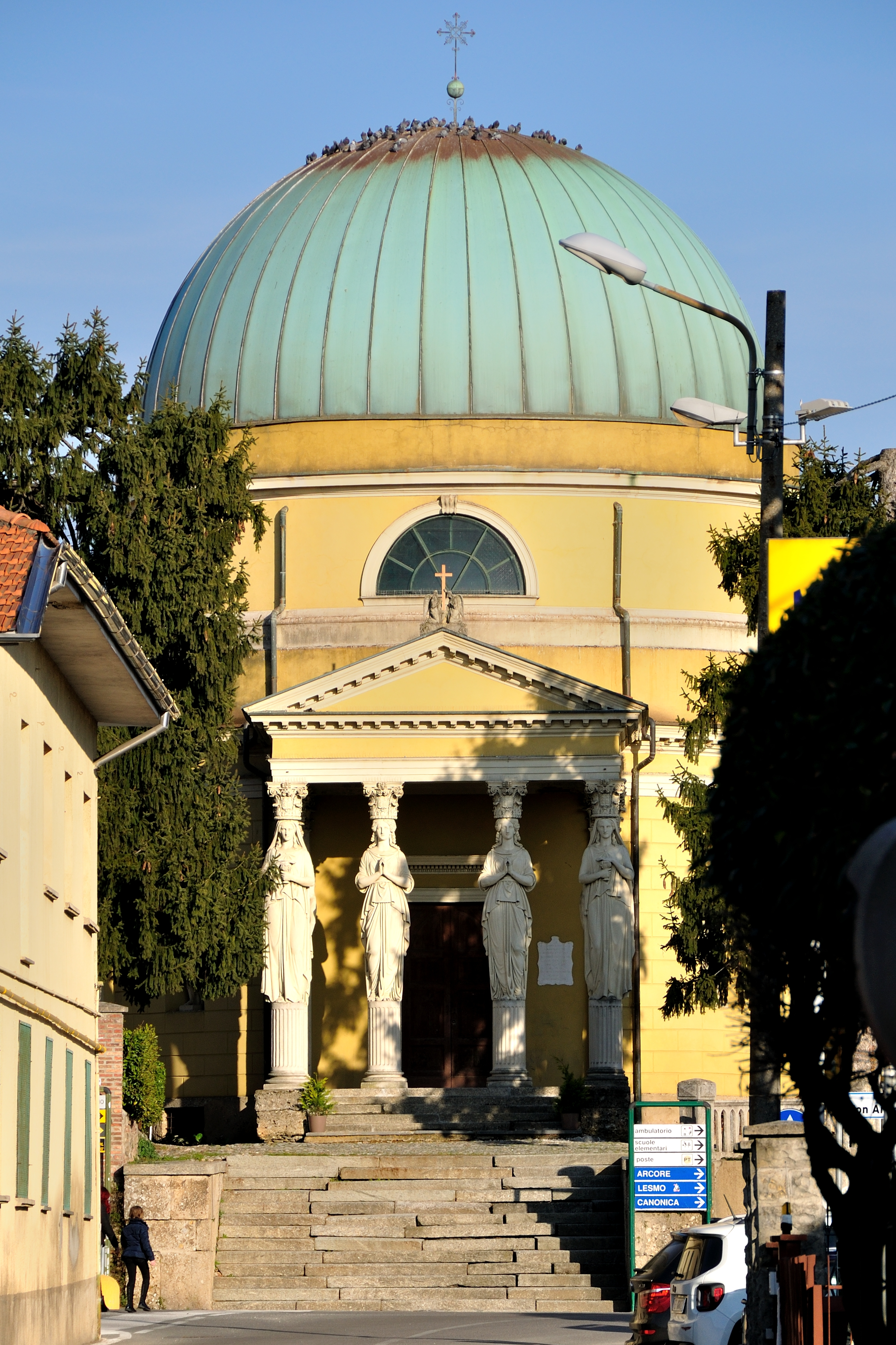 L'immagine rappresenta la visione frontale della rotonda con la scalinata che la eleva dal piano stradale.